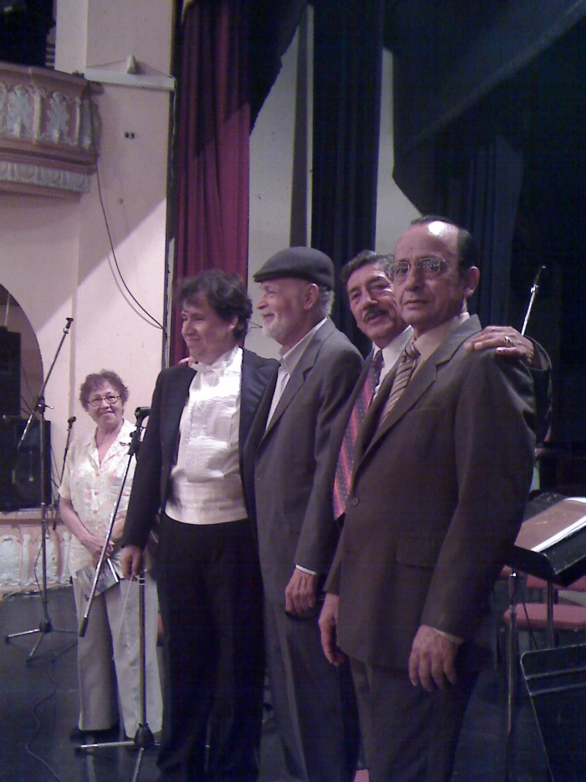 Con el director de la Orquesta Filarmonica de Honduras: Jorge Mejia, el escritor Roberto Sosa y Belisario Romero.